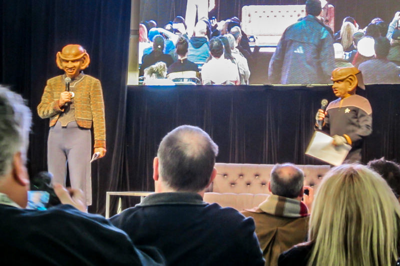 Max Grodenchik and Aron Eisenberg, Rom and Nog on Star Trek: Deep Space Nine.